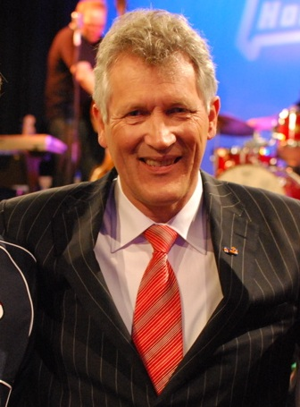 Bankier Dirk Scheringa tijdens opnamen voor het televisieprogramma Holland Sport